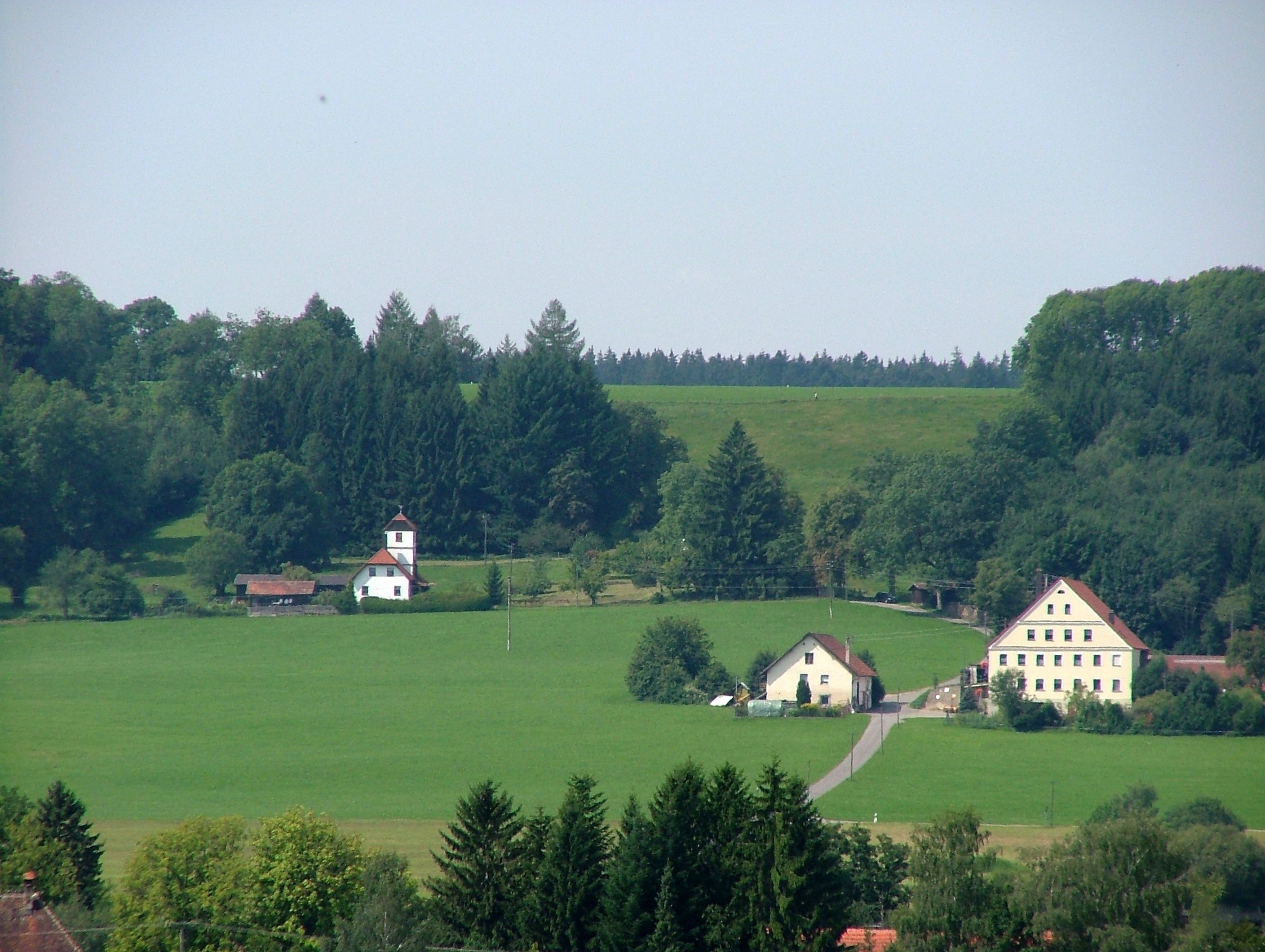 Ottobeuren Schellenberg Böglins, ehemalige Fuchsfarm